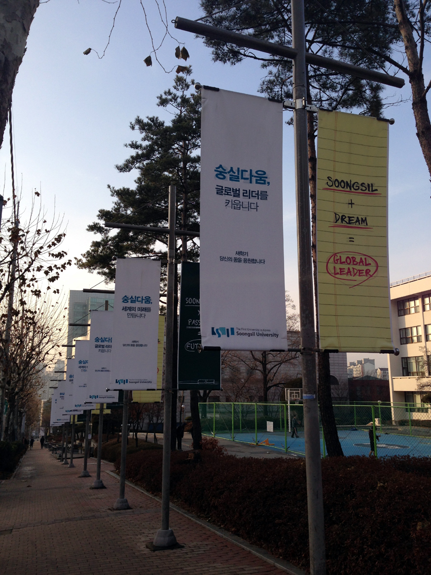 숭실대학교 2012년 2학기 캐치프레이즈